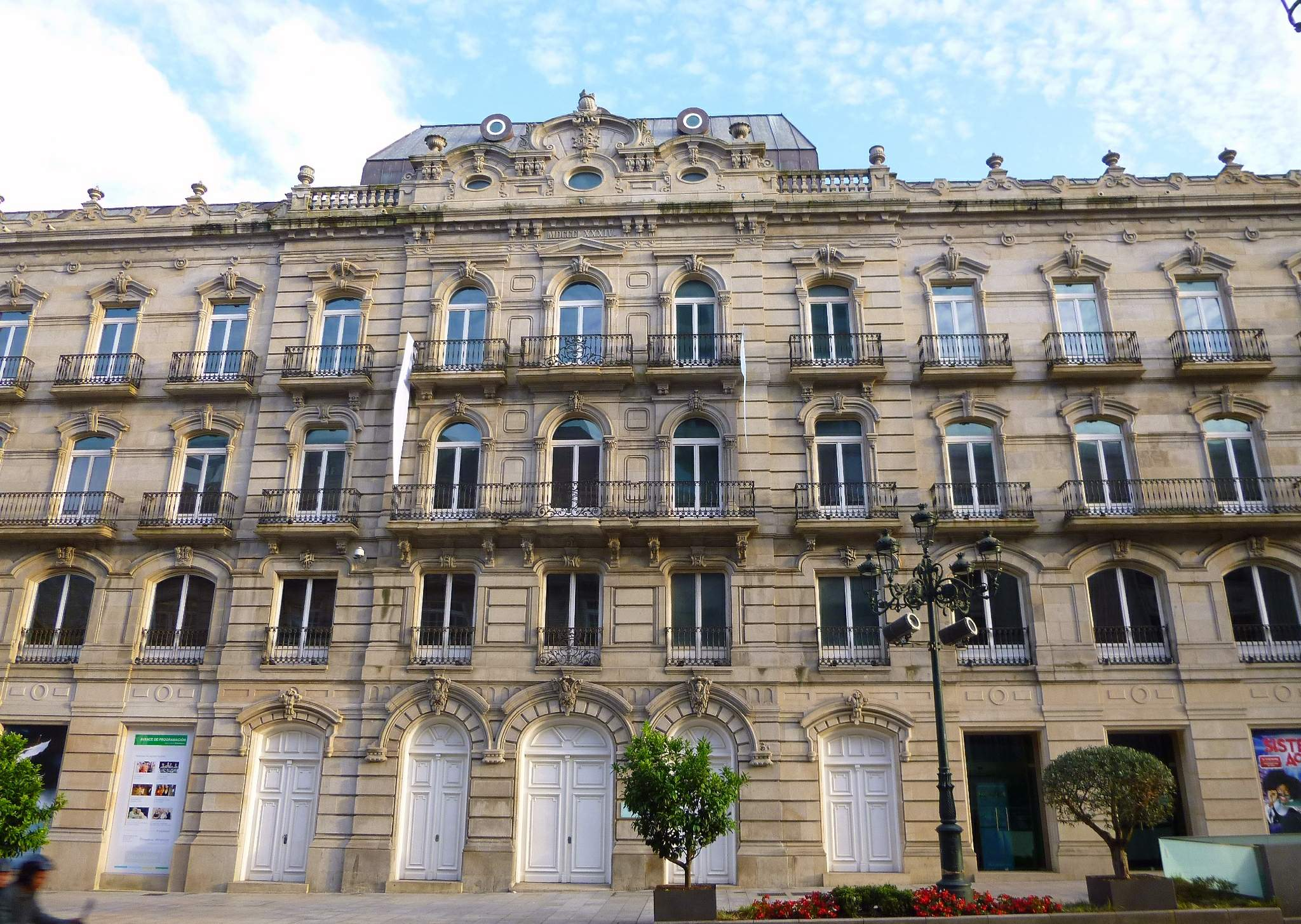 Vigo - Centro Social Afundación Vigo (Casas de Manuel Bárcena Franco)